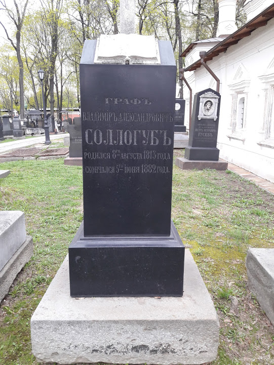 Соллогуб, Владимир Александрович